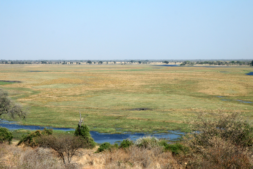 Border Botswana-Namibia